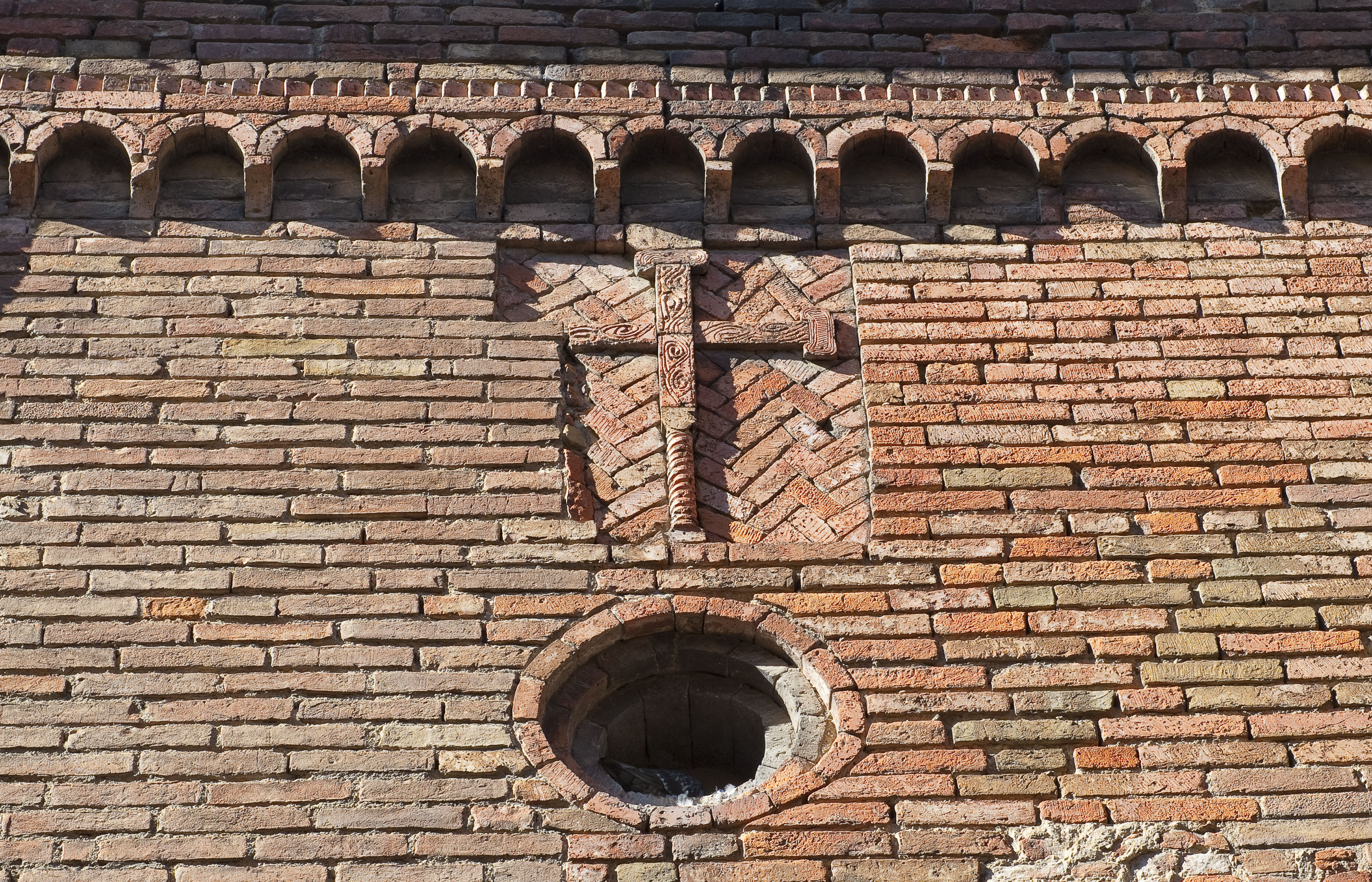 Croce in mattoni situata sulla fiancata destra della Collegiata dei Santi Lorenzo e Leonardo a Castelfiorentino